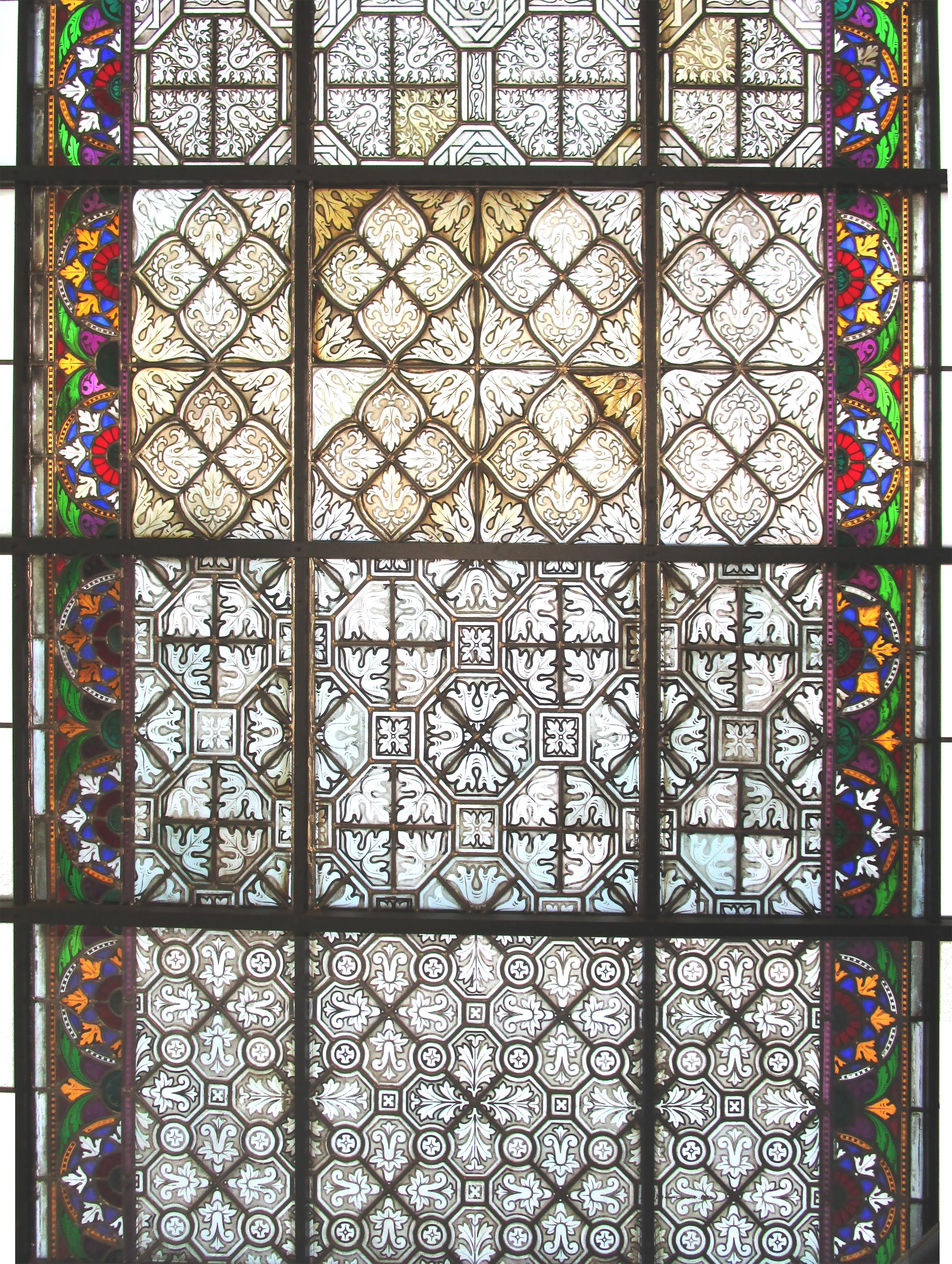 Teil der Innenverglasung der Fenster im Turmraum vor der Fürstenloge der Kirche St. Nikolai ("Schelfkirche"), Schwerin; angefertigt vom Glasmaler Ernst Gillmeister anno 1858.